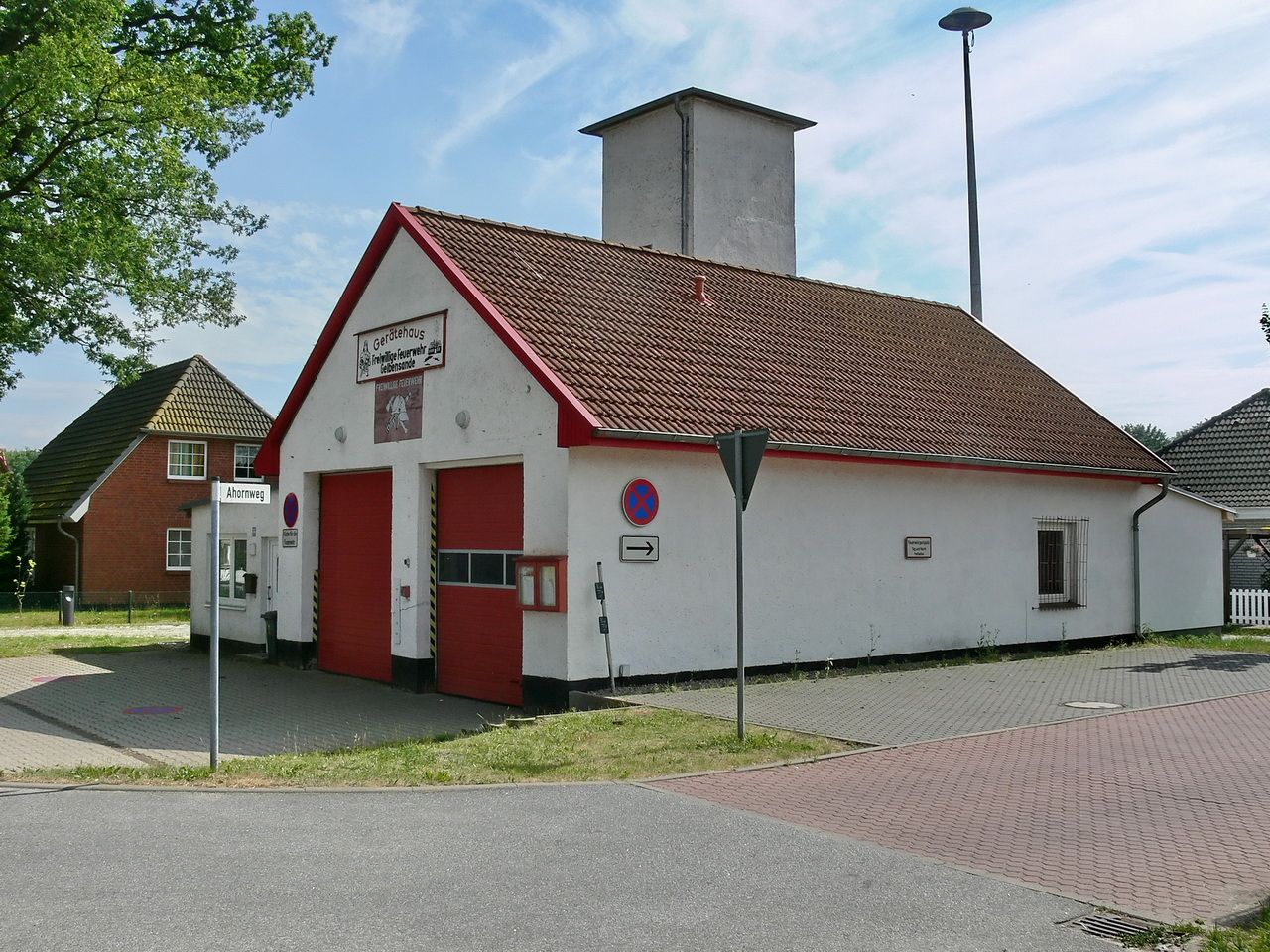 Feuerwehr von Gelbensande - Gelbensande Fire Department